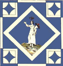 Bandiera della magistratura di Santa Maria del Gioco del Ponte di Pisa